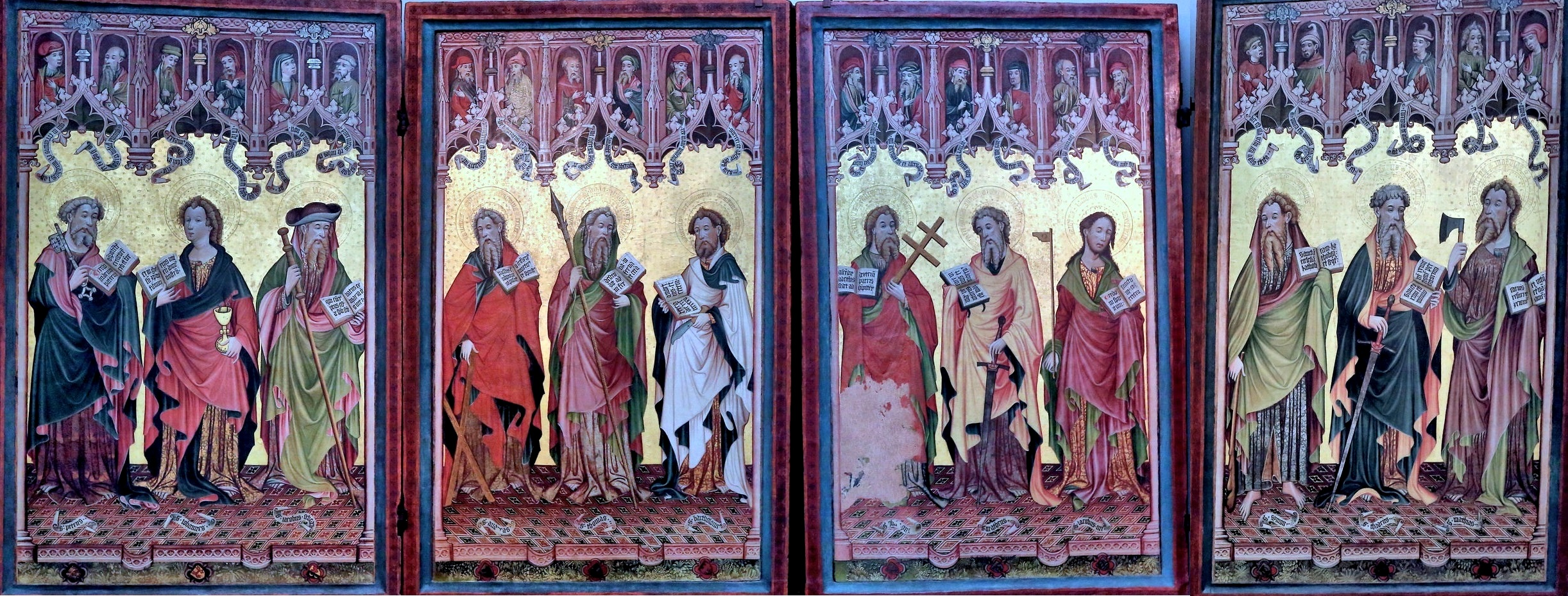 Niedersächsisches Landesmuseum, Göttinger Barfüßeraltar: Zwölf Apostel mit Zeilen des Apostolischen Glaubensbekenntnisses